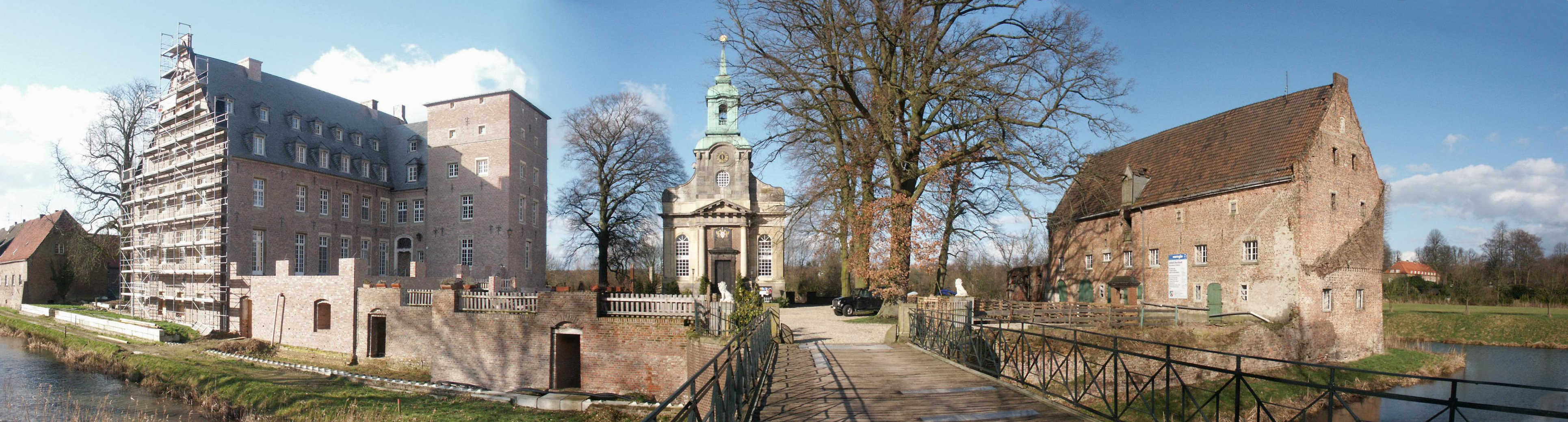 Panorama des Schlosses Diersfordt, Südansicht, Stitching aus drei Einzelbildern